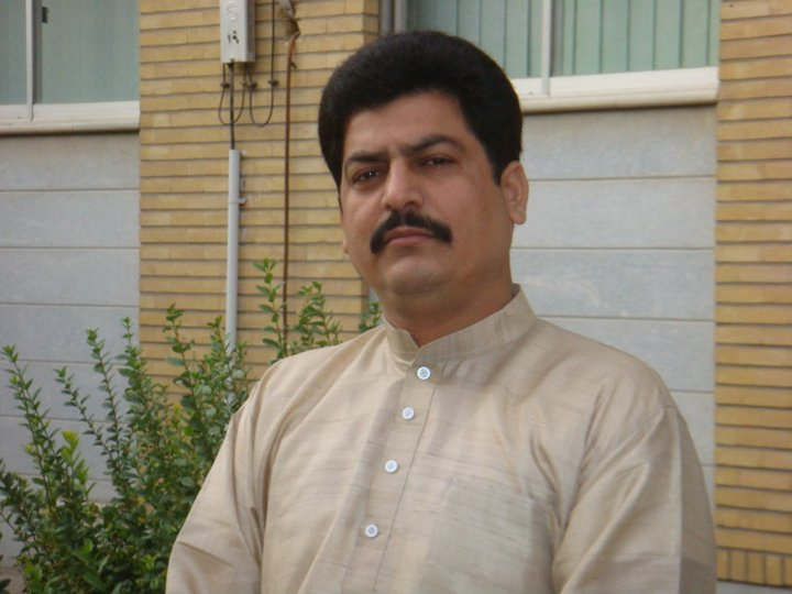 He is intezar abidi